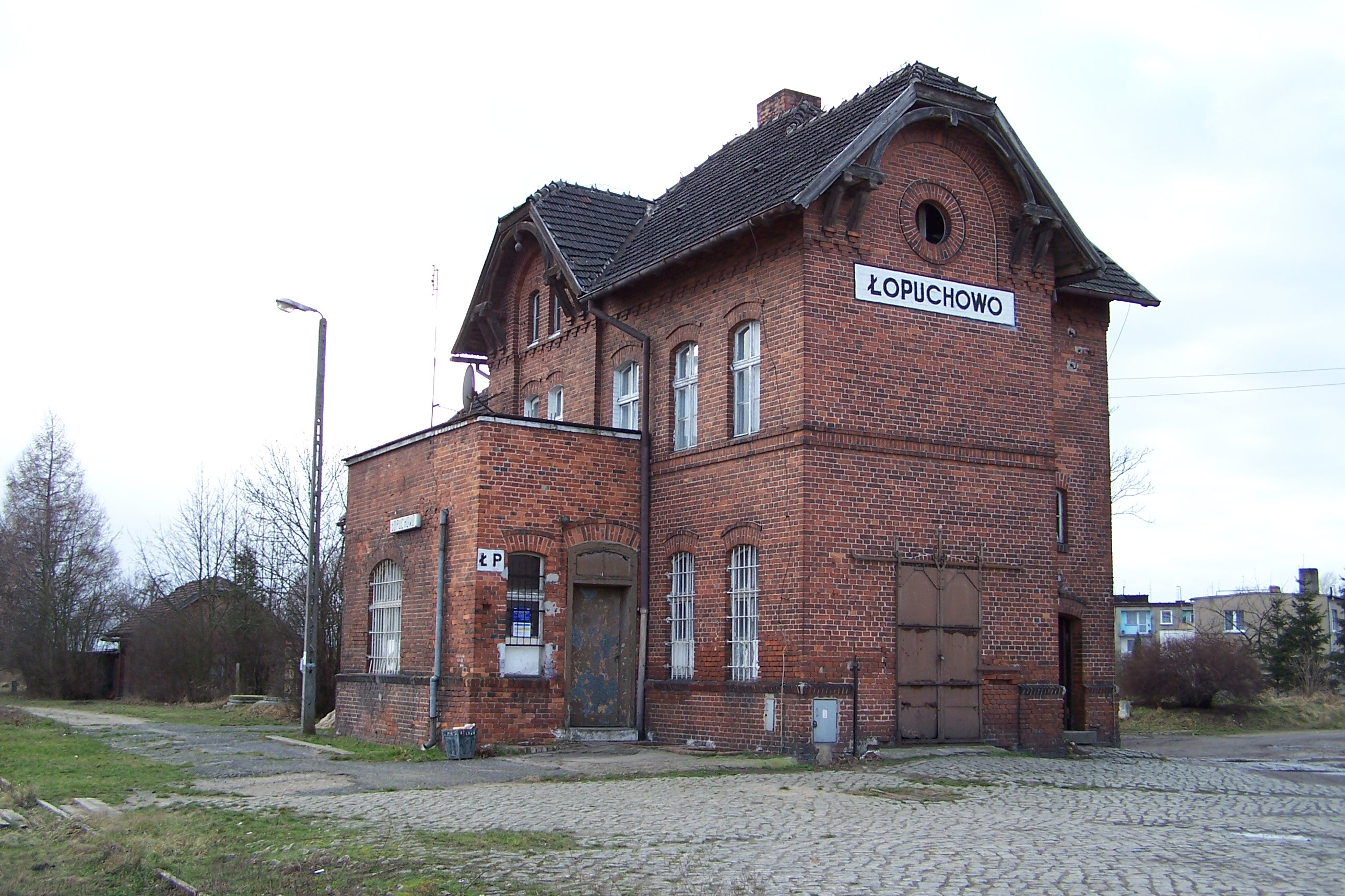 Stacja kolejowa w Łopuchowie (pow. poznański)